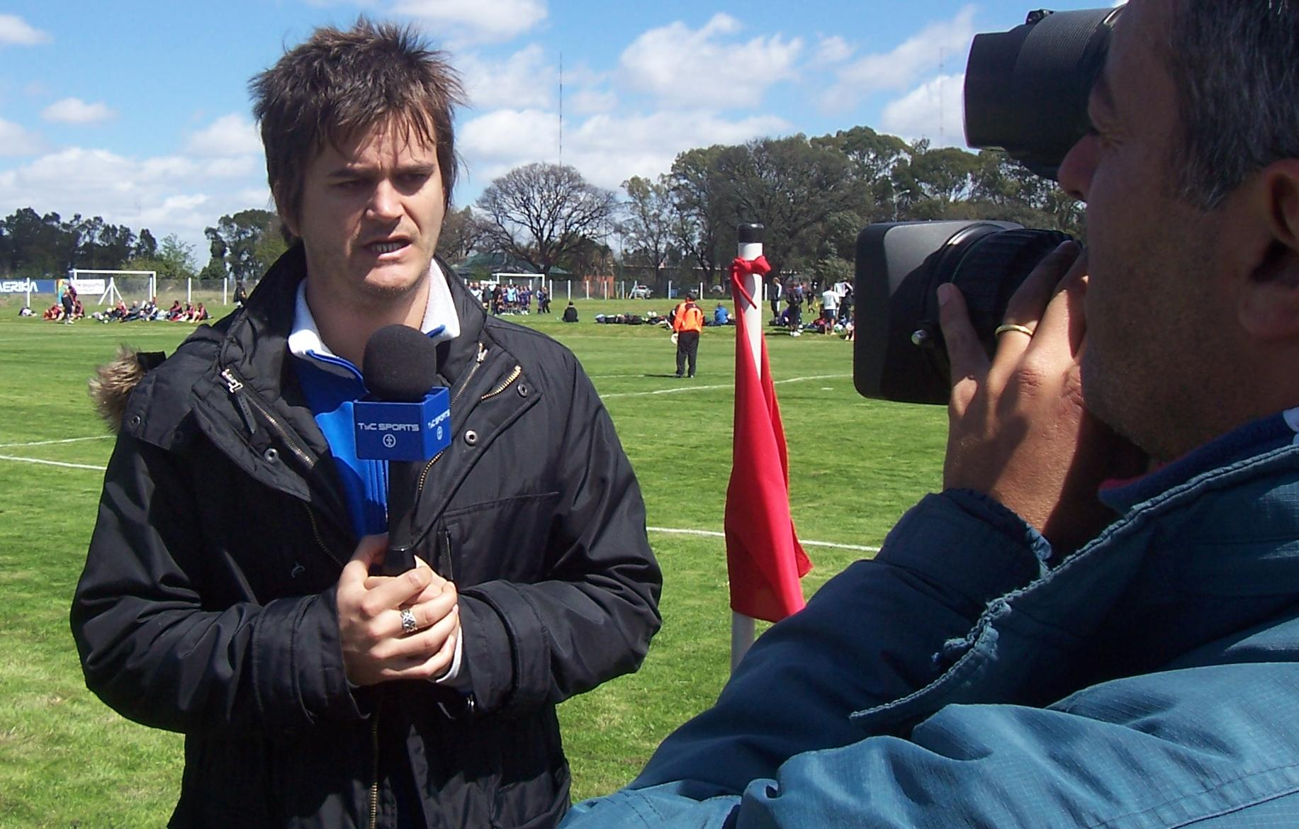 Movilero de TyC Sports cubriendo el 10° Mundial de fútbol Gay en la ciudad de Buenos Aires.